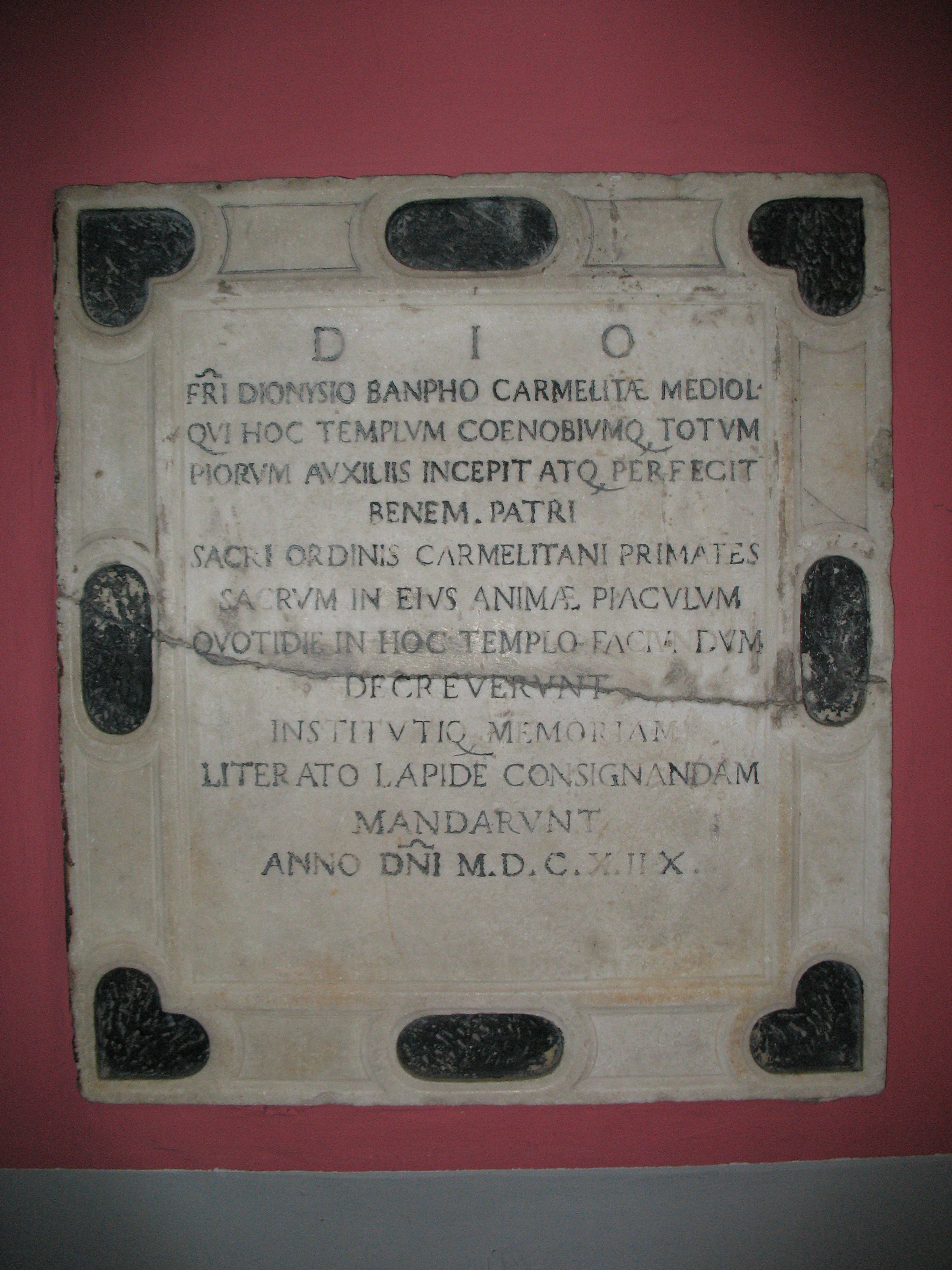 Lapide Padre Dionisio Banpho